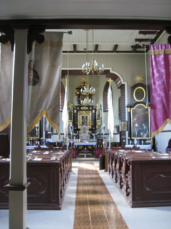 Паланечка. Драўляны касцёл